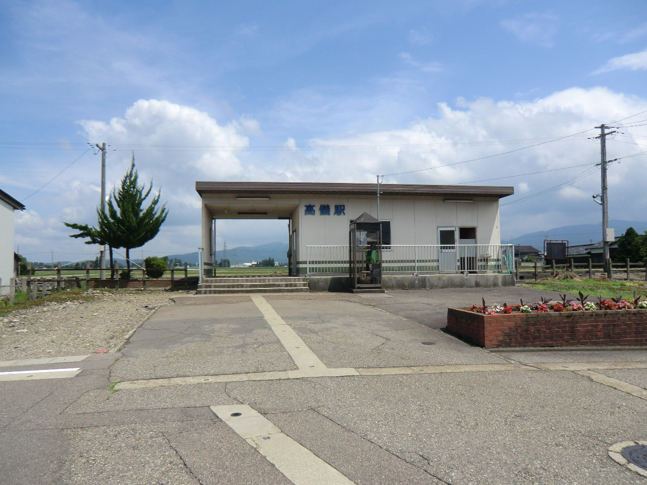 高儀駅